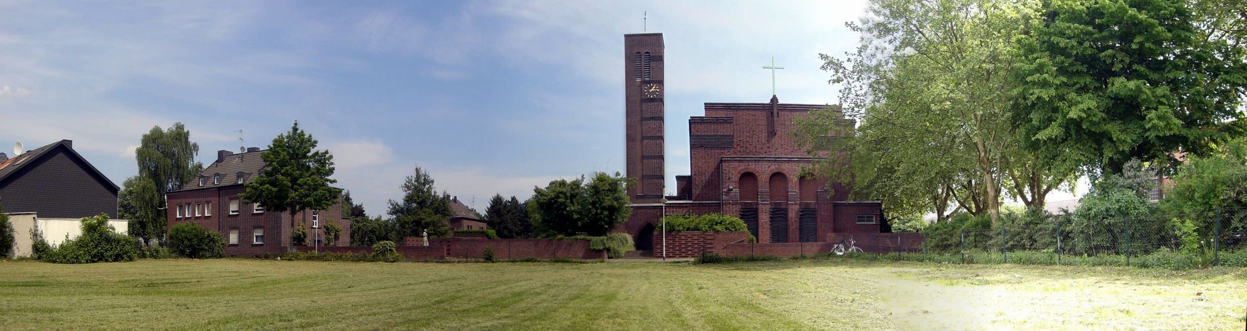 Panoramabild, Kirche St. Notburga im Viersener Stadtteil Rahser.